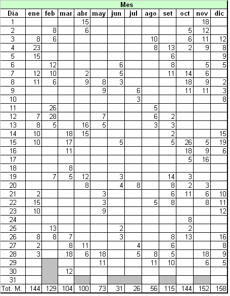 Ejemplo de datos diarios de precipitaciones en una estación hipotética